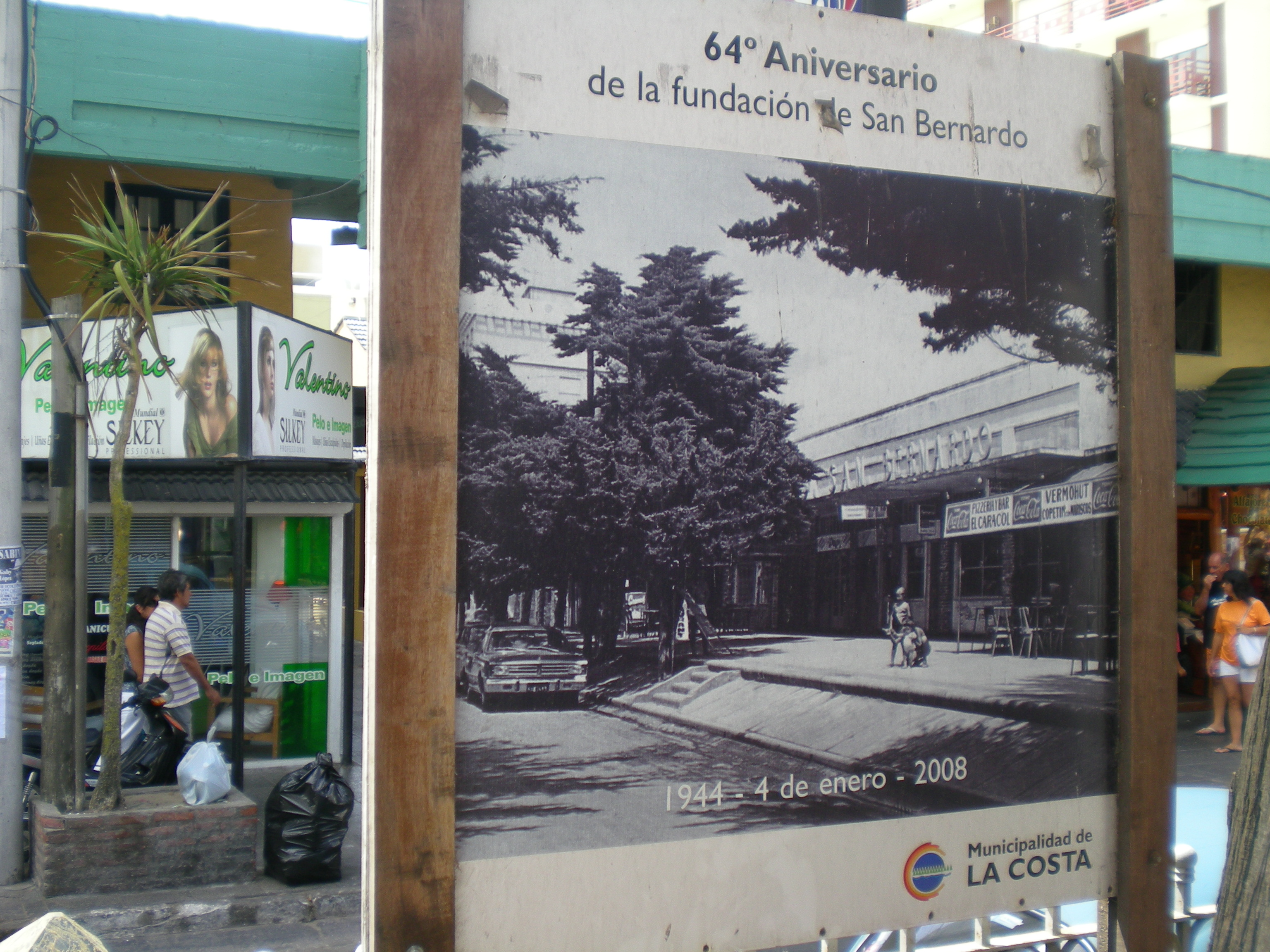 Foto de la Vereda Alta, lugar característico de San Bernardo del Tuyú.